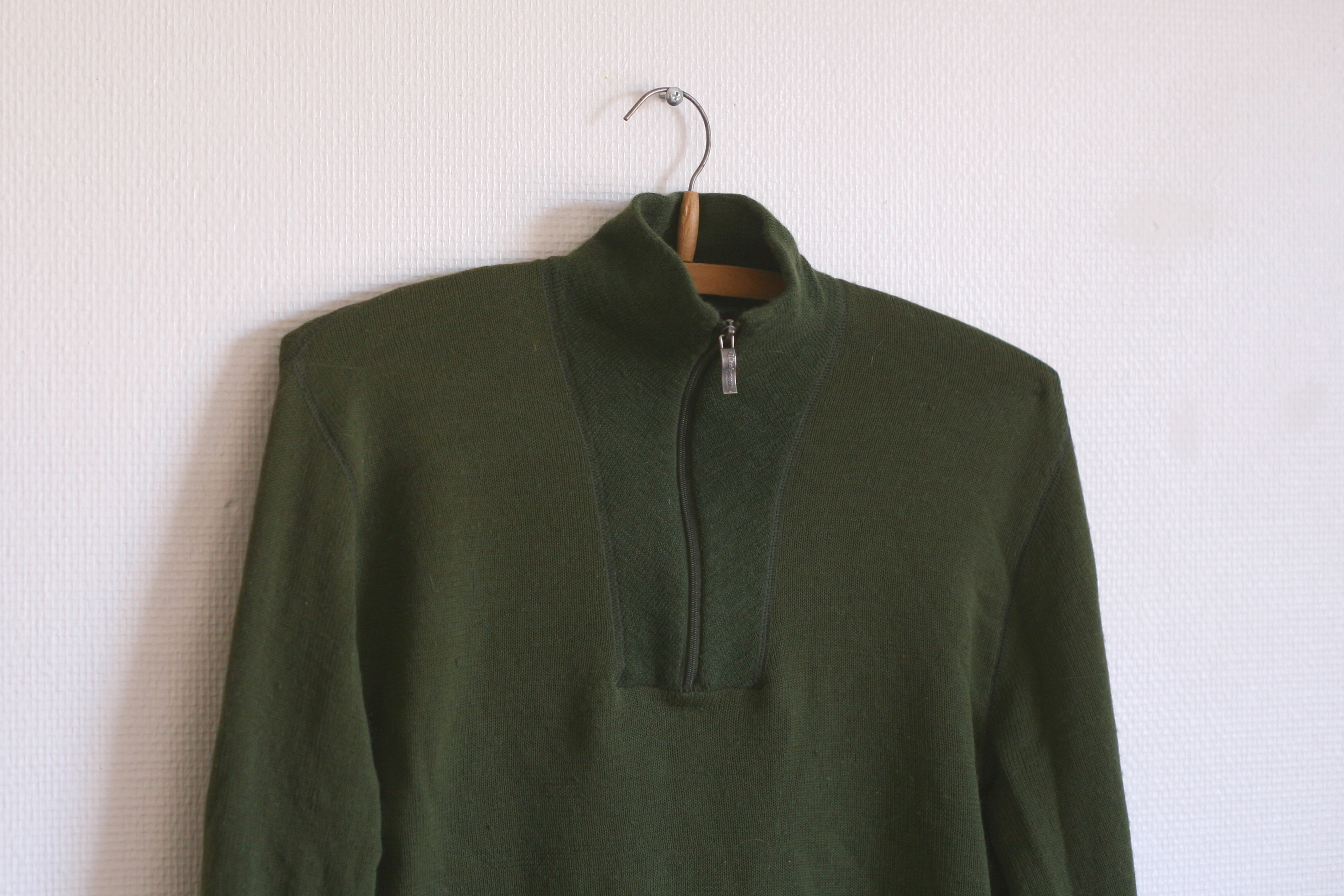 Tröja från den svenska tillverkaren Woolpower